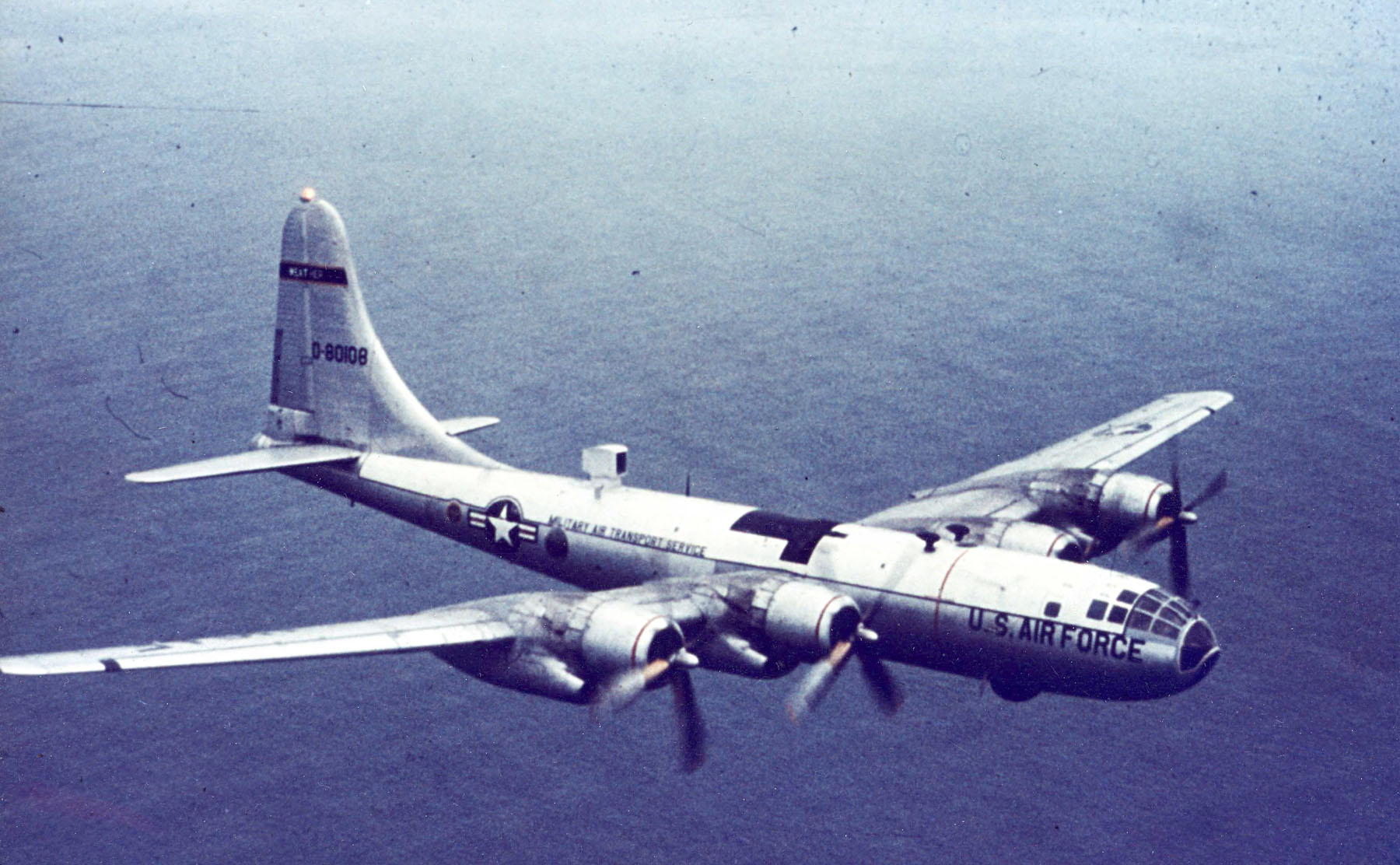 Boeing WB-50D (SN 48-108) in flight